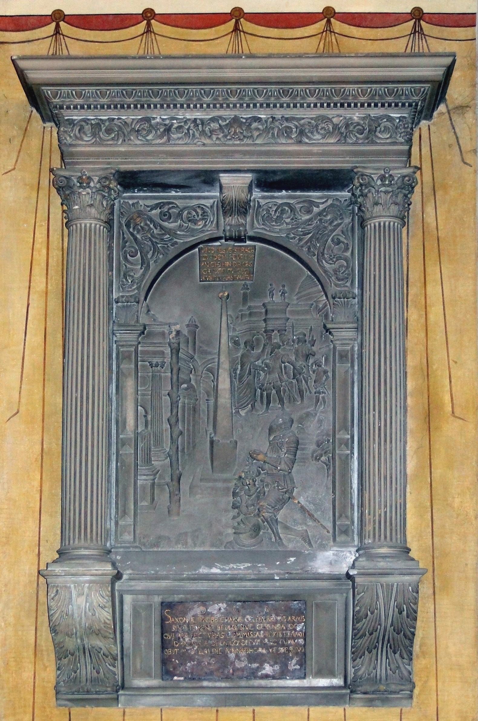 Epitaph Dehn-Rotfelser vom alten Frauenkirchhof, heute Himmelfahrtskirche Leuben